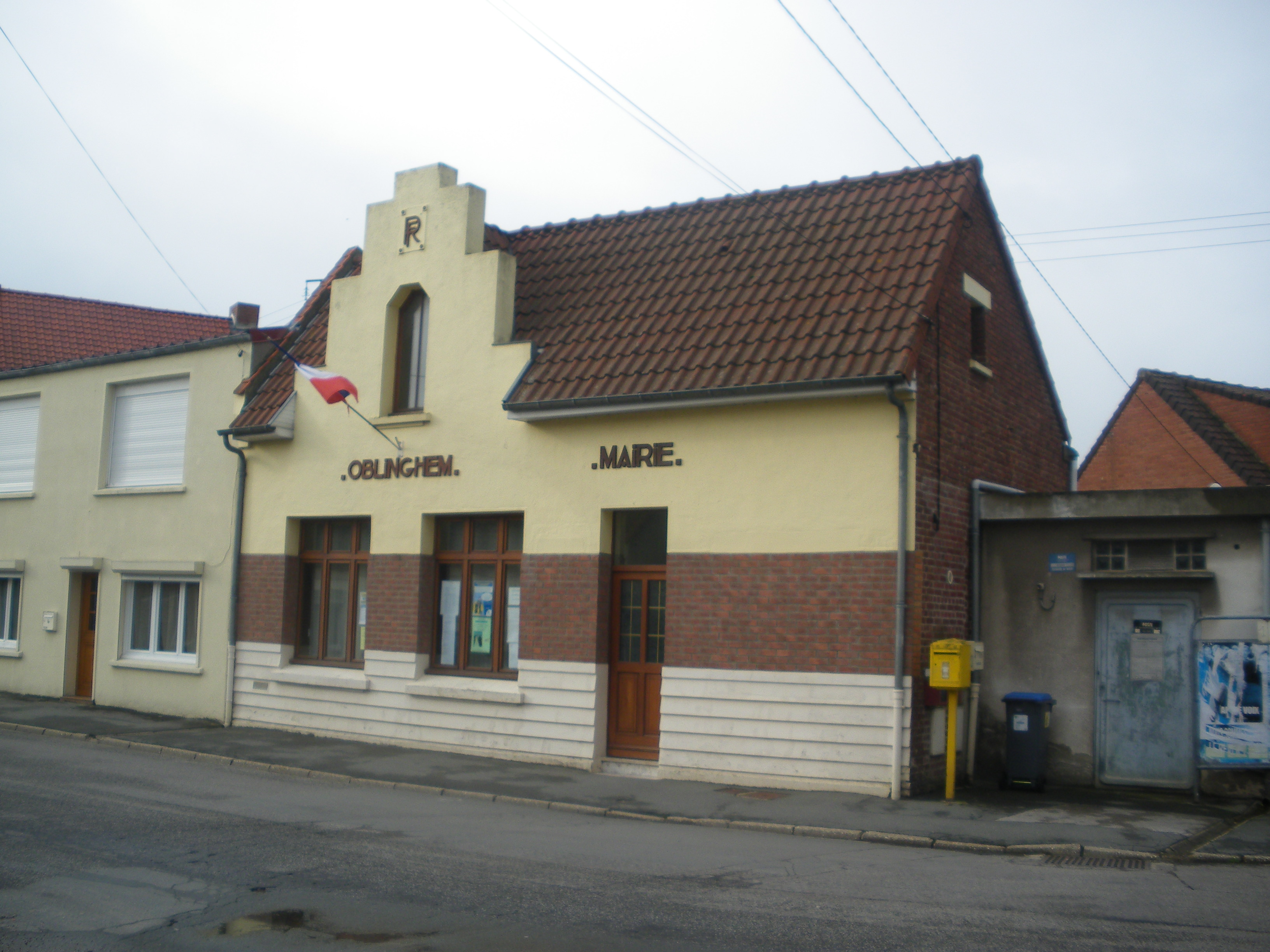 Vue de la mairie d'Oblinghem.